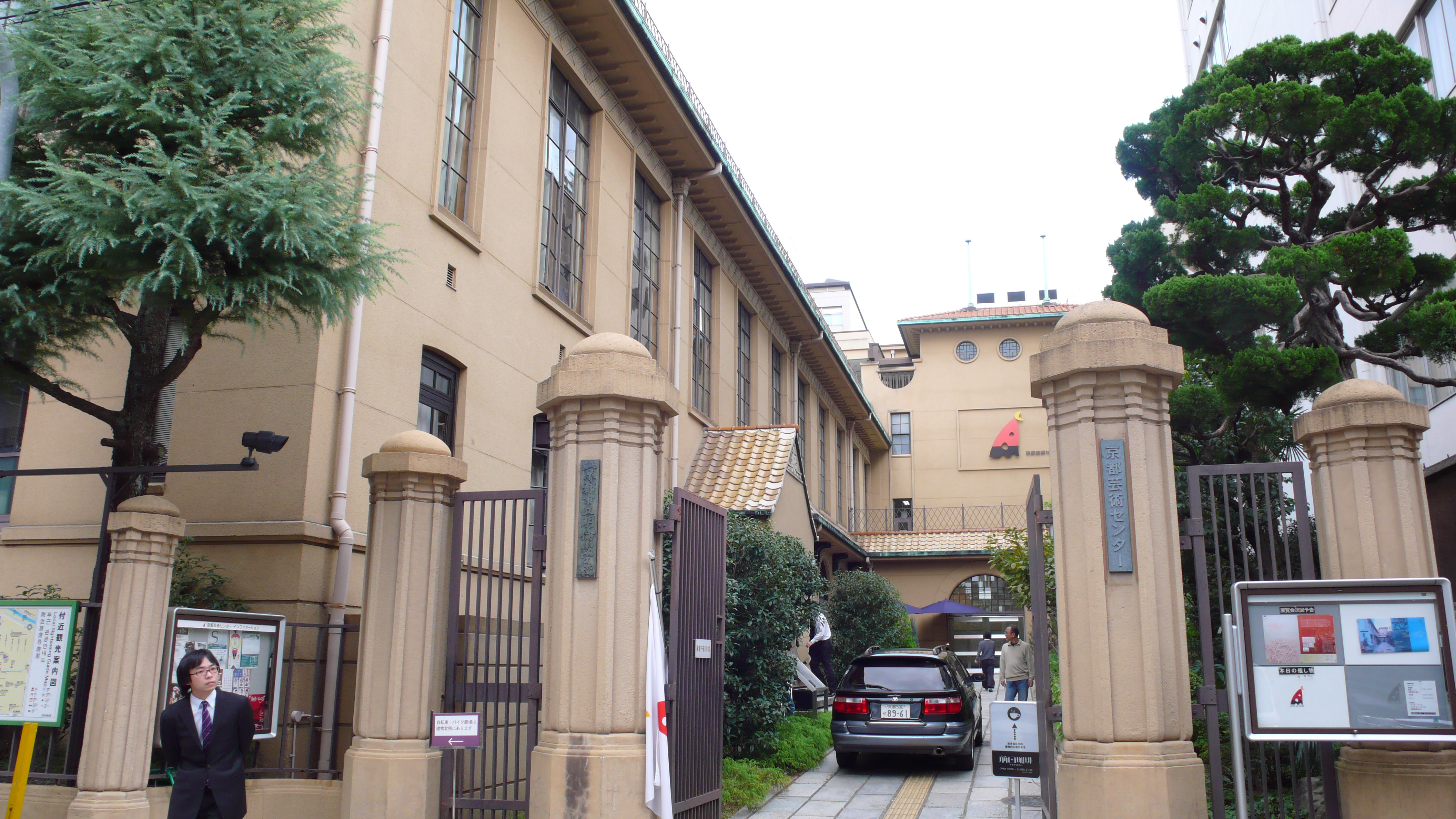 京都芸術センター外観